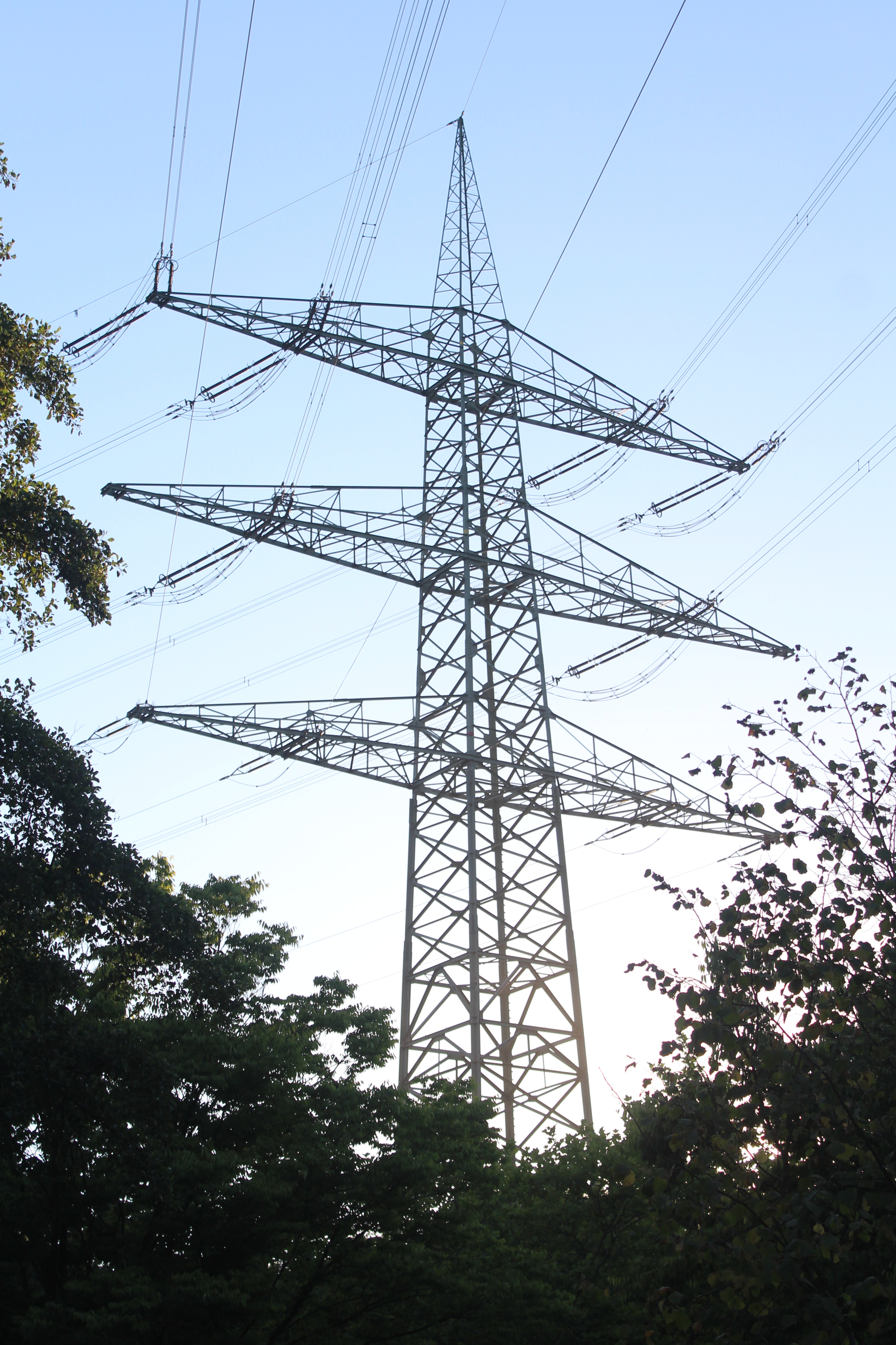 Oberteil des Mastes 93 der Anlage 4101